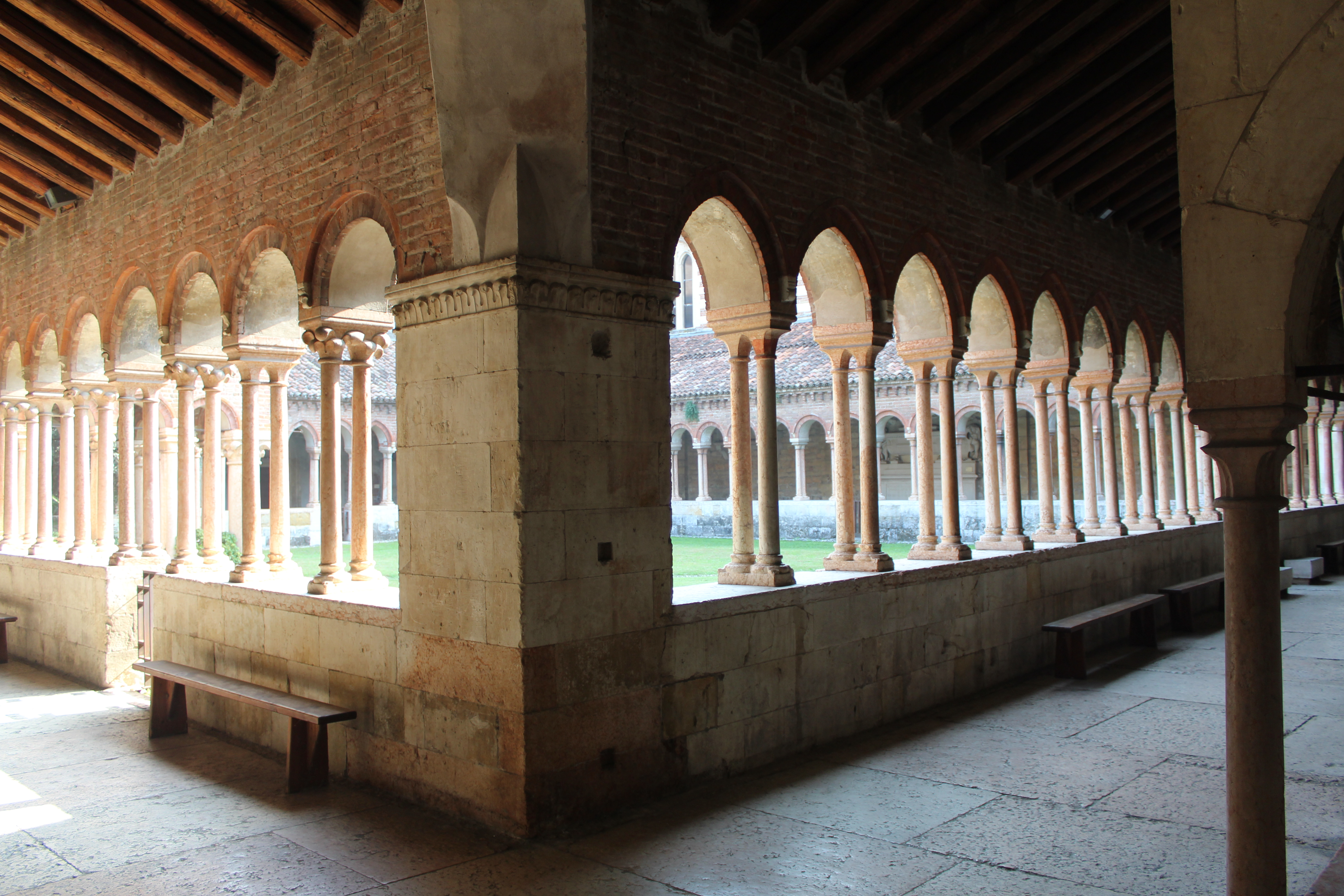 Chiostro della basilica di San Zeno a Verona